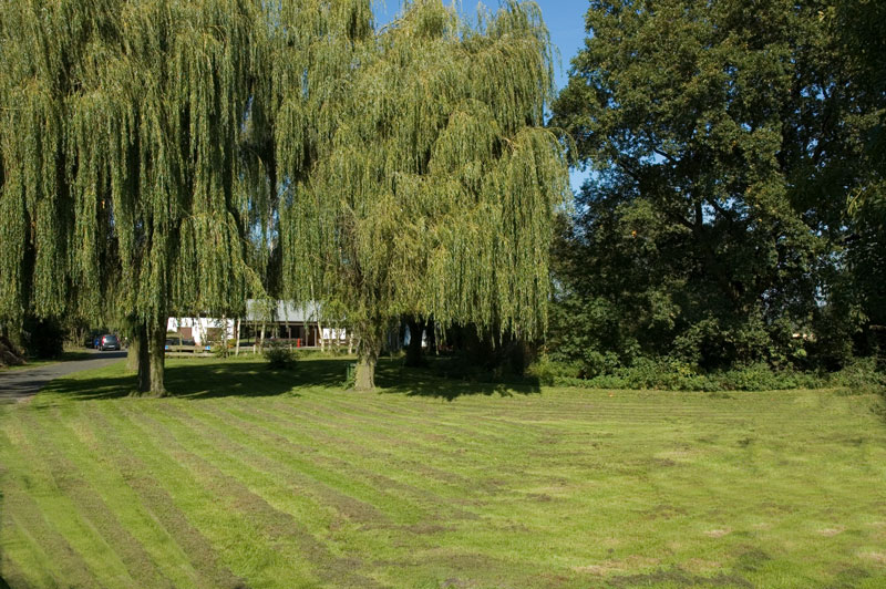 Germany Bergkamen Naturfreibad Heil